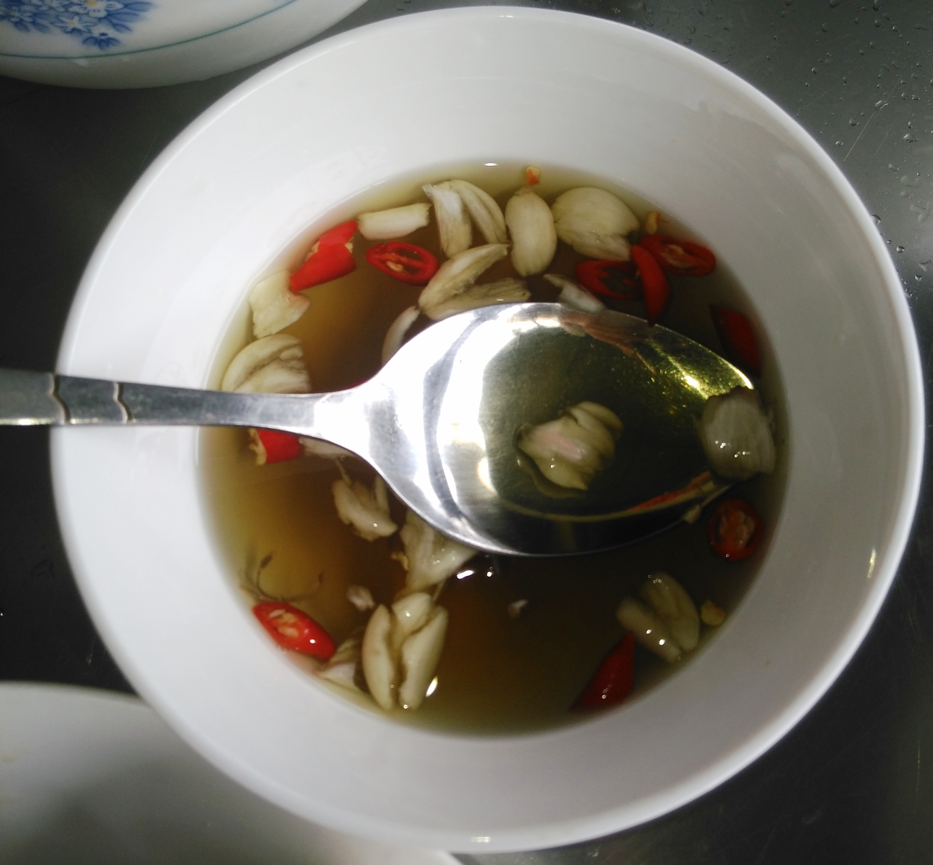 Nước mắm Gio Hải của chú Trong, tết 2018